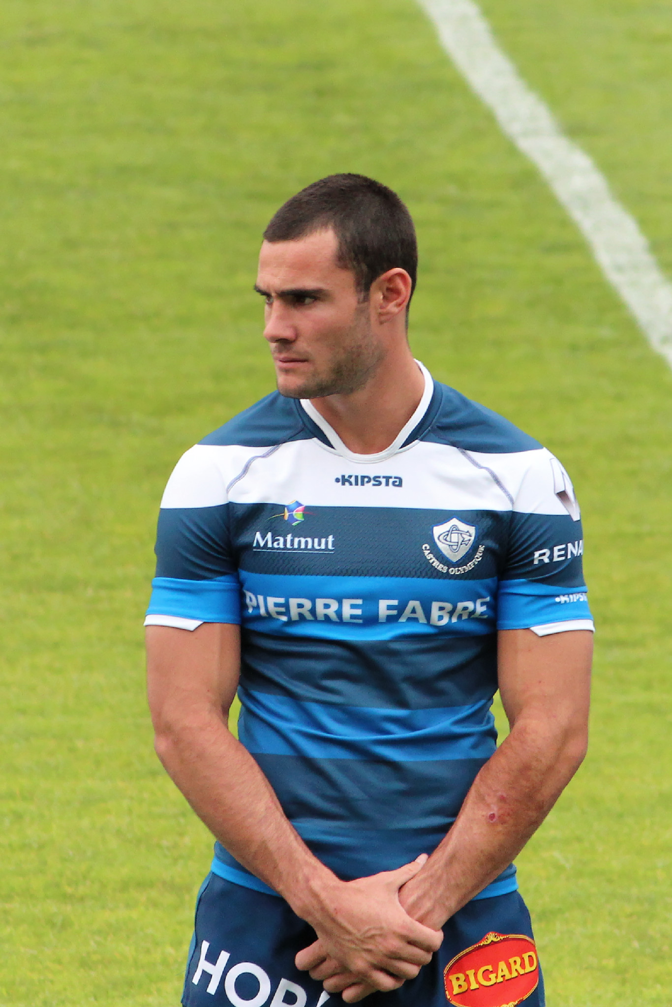 Joueurs du Castres Olympique lors de la présentation de l'équipe pour la saison 2015-2016